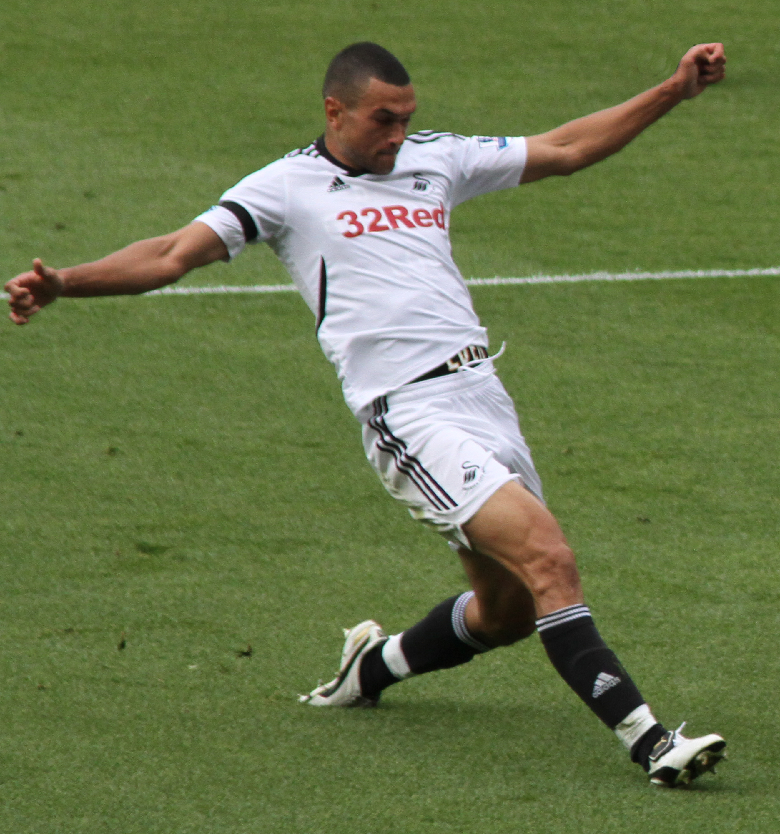 Steven Caulker & Robin Van Persie 3